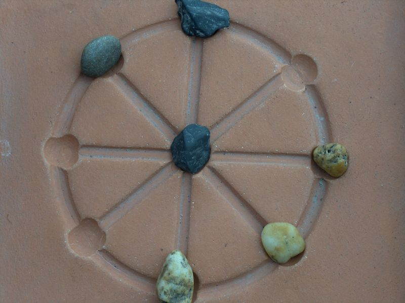 Rekonstruktion eines Mühlespiels aus der Römerzeit, Carnuntum April 2005